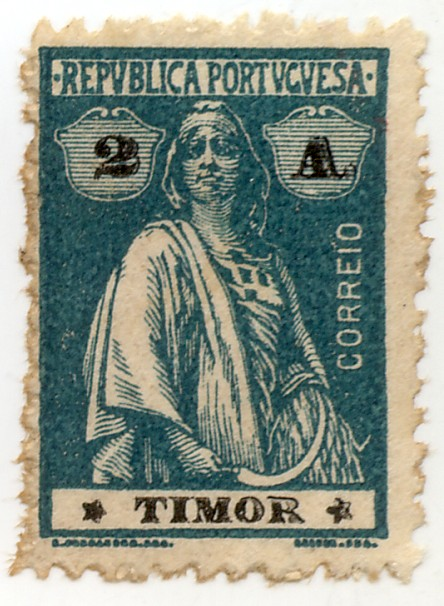 Briefmarke von Portugiesisch-Timor mit der Göttin Ceres. Ab 1910 im Gebrauch. Wert: 2 Avos